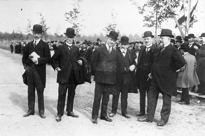 Groepsfoto van de directie van de "Maastrichtse Zinkwit Maatschappij" in Eijsden, Limburg, bij de feestelijkheden in het dorp t.g.v. het 50-jarig bestaan van het bedrijf. In het midden de hoofddirecteur Fernand Pisart. Fotocollectie RHCL Maastricht, GAM 33387.